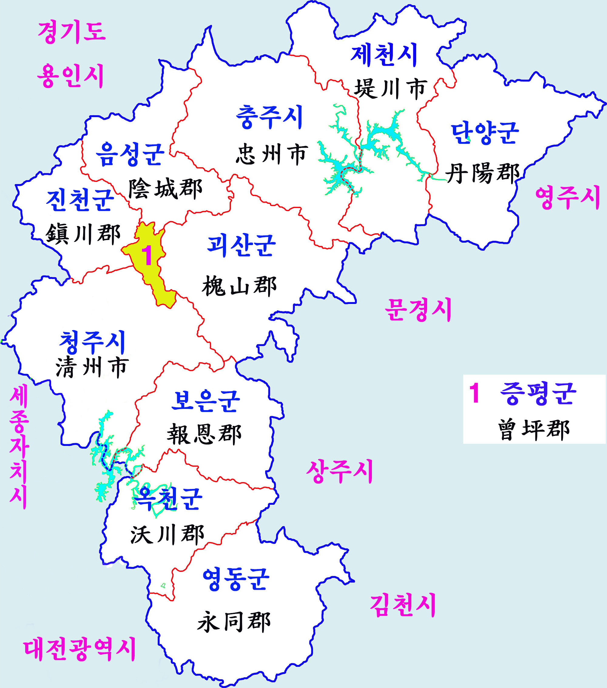 大韓民国の忠清北道の2014年7月12日現在の行政区画